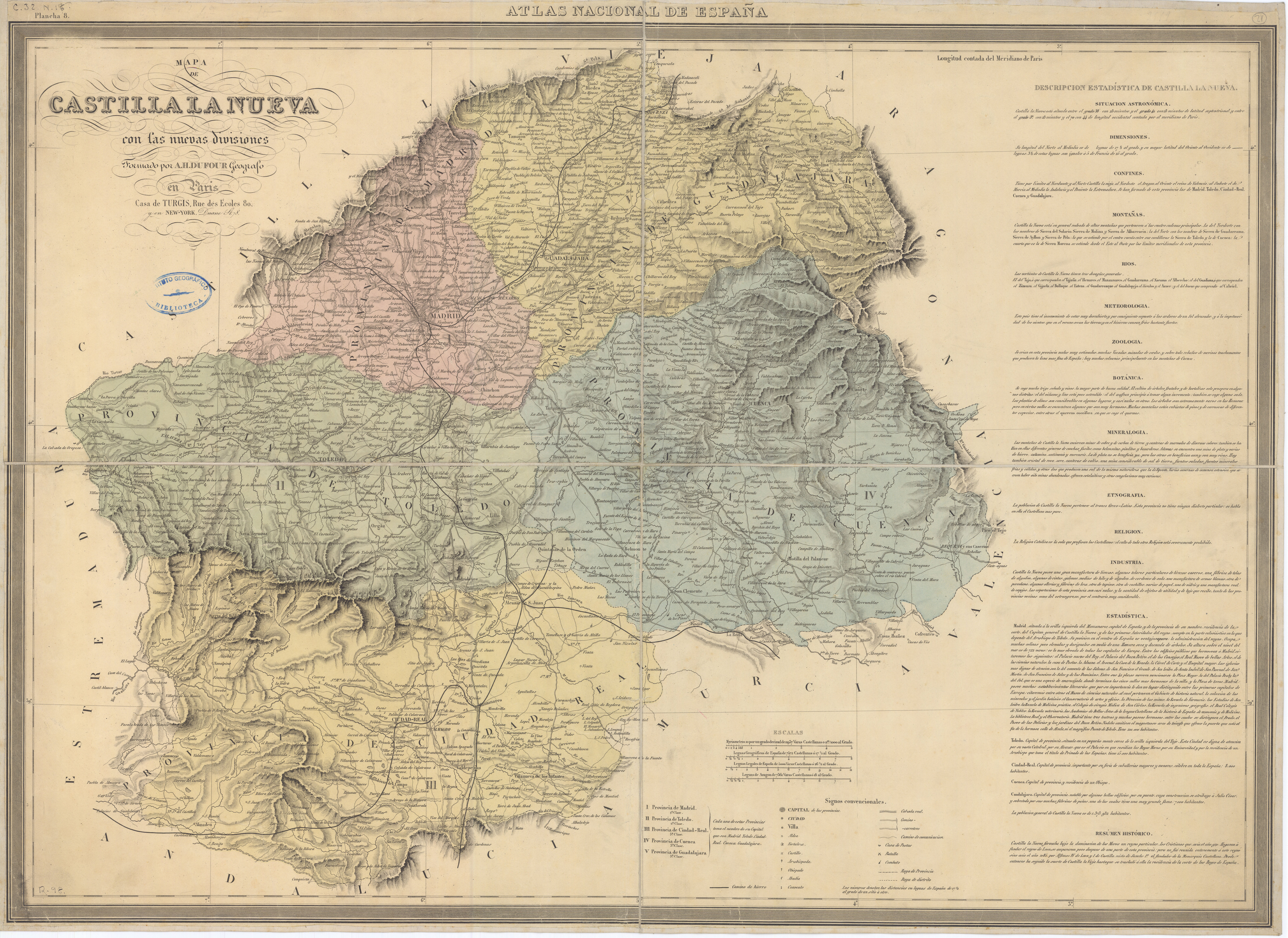 Castilla la Nueva con las nuevas divisiones (A.H. Dufour geógrafo). Provincias de Madrid, Guadalajara, Toledo, Cuenca y Ciudad Real.